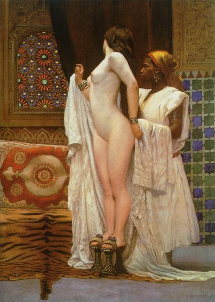 Après le bain.title QS:P1476,fr:"Après le bain." label QS:Lfr,"Après le bain."